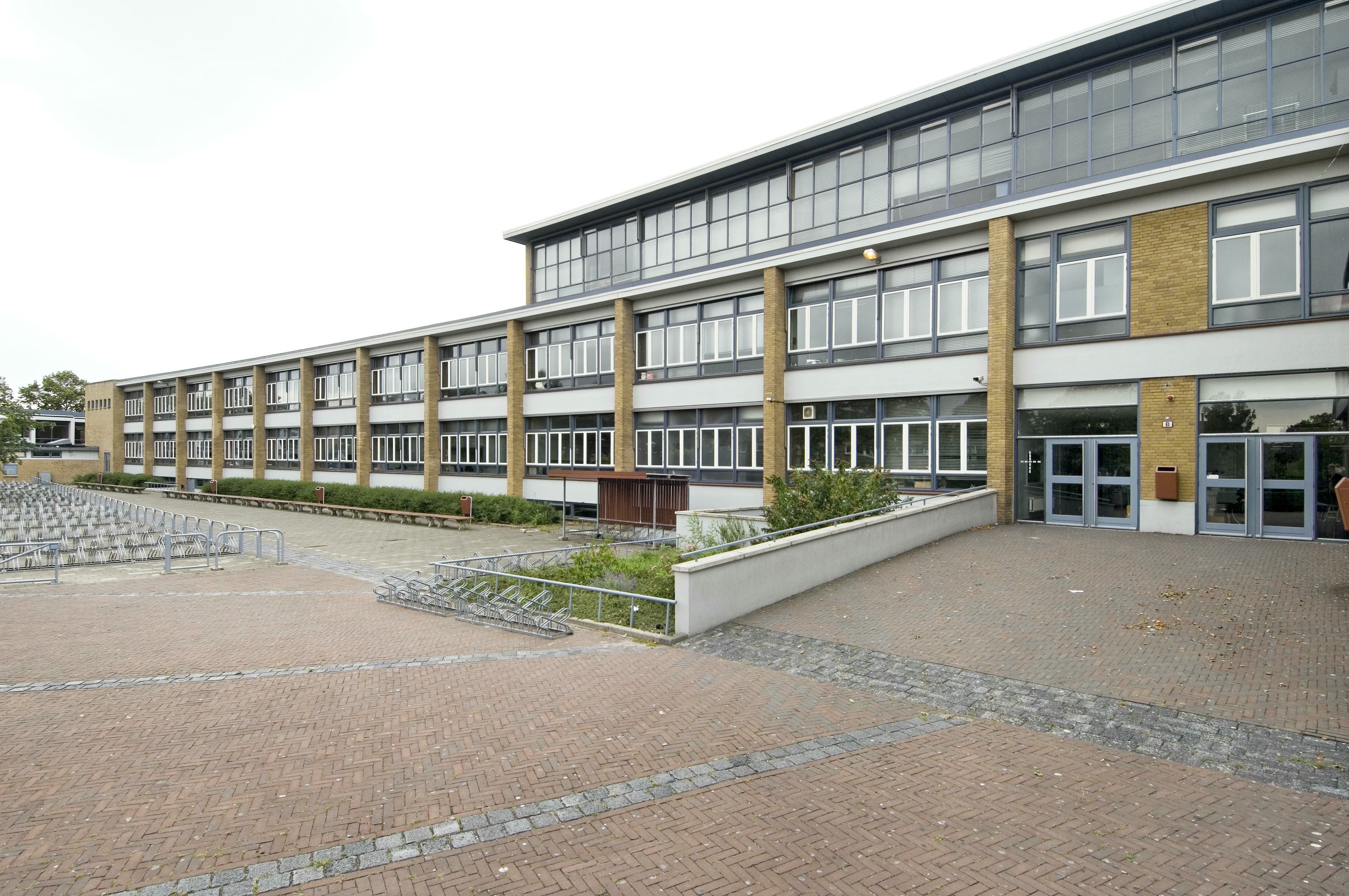 Grotiuslyceum: Overzicht van de voorgevel met fietsenstalling (opmerking: Gefotografeerd voor Monumenten van Herrezen Nederland)